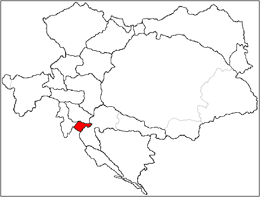 Poloha Rijeky a okolí na mapě Rakousko-Uherska